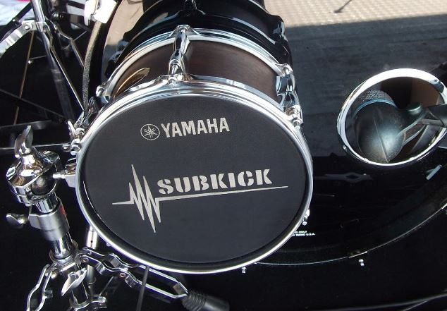 Transductor comercial